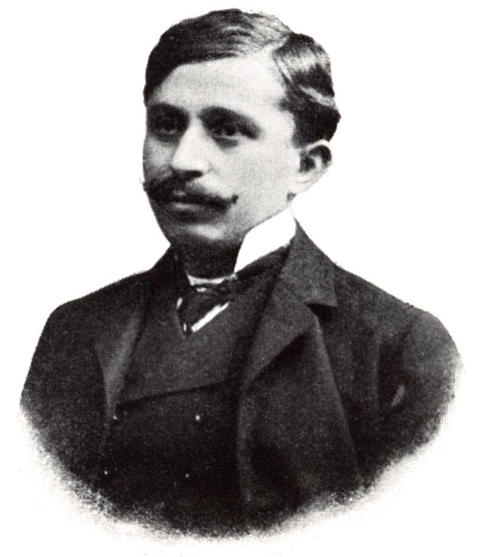 Buza Barna (1873-1944) politikus, miniszter